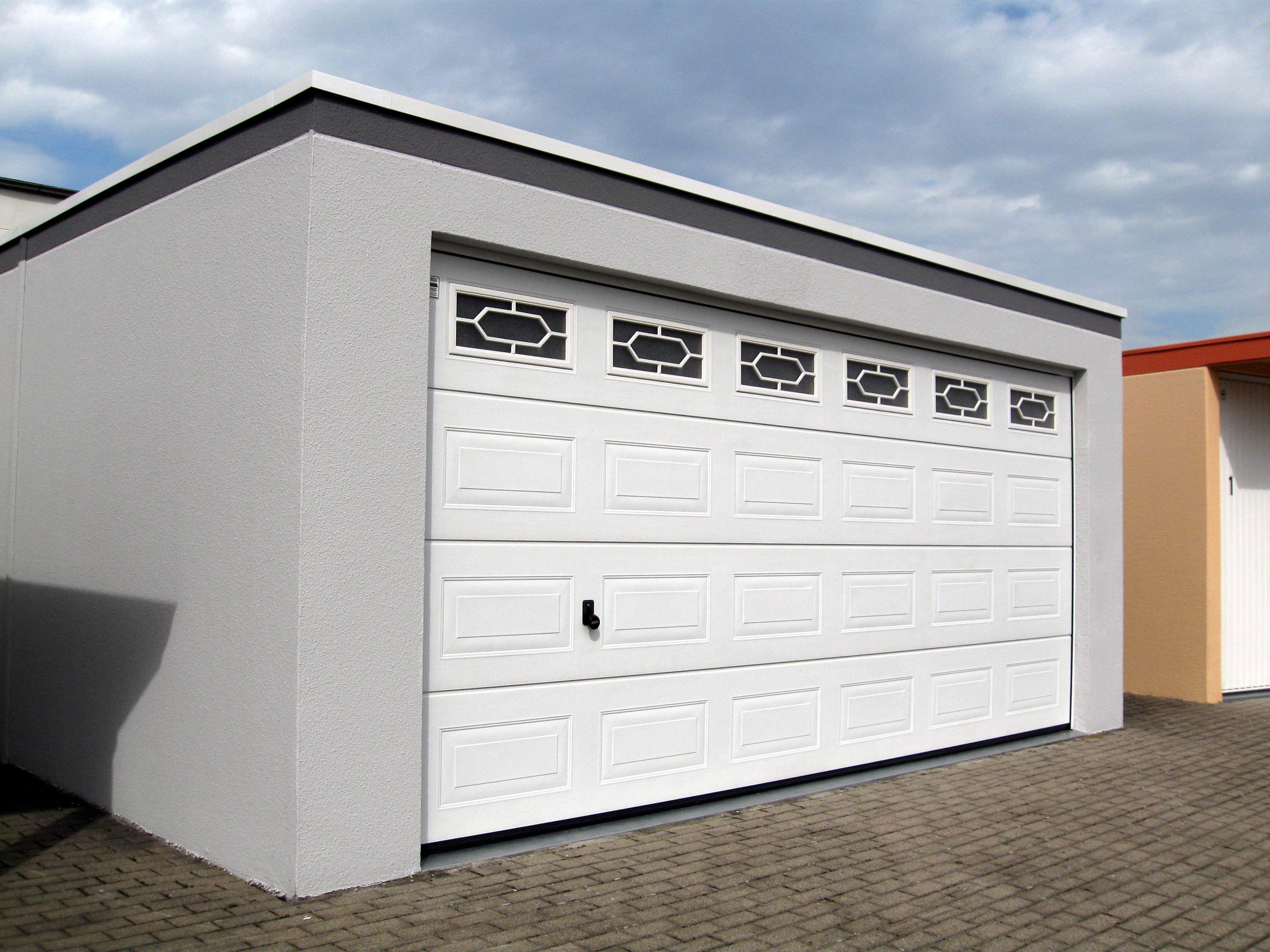 Garagenausstellung in Gaggenau Rotenfels